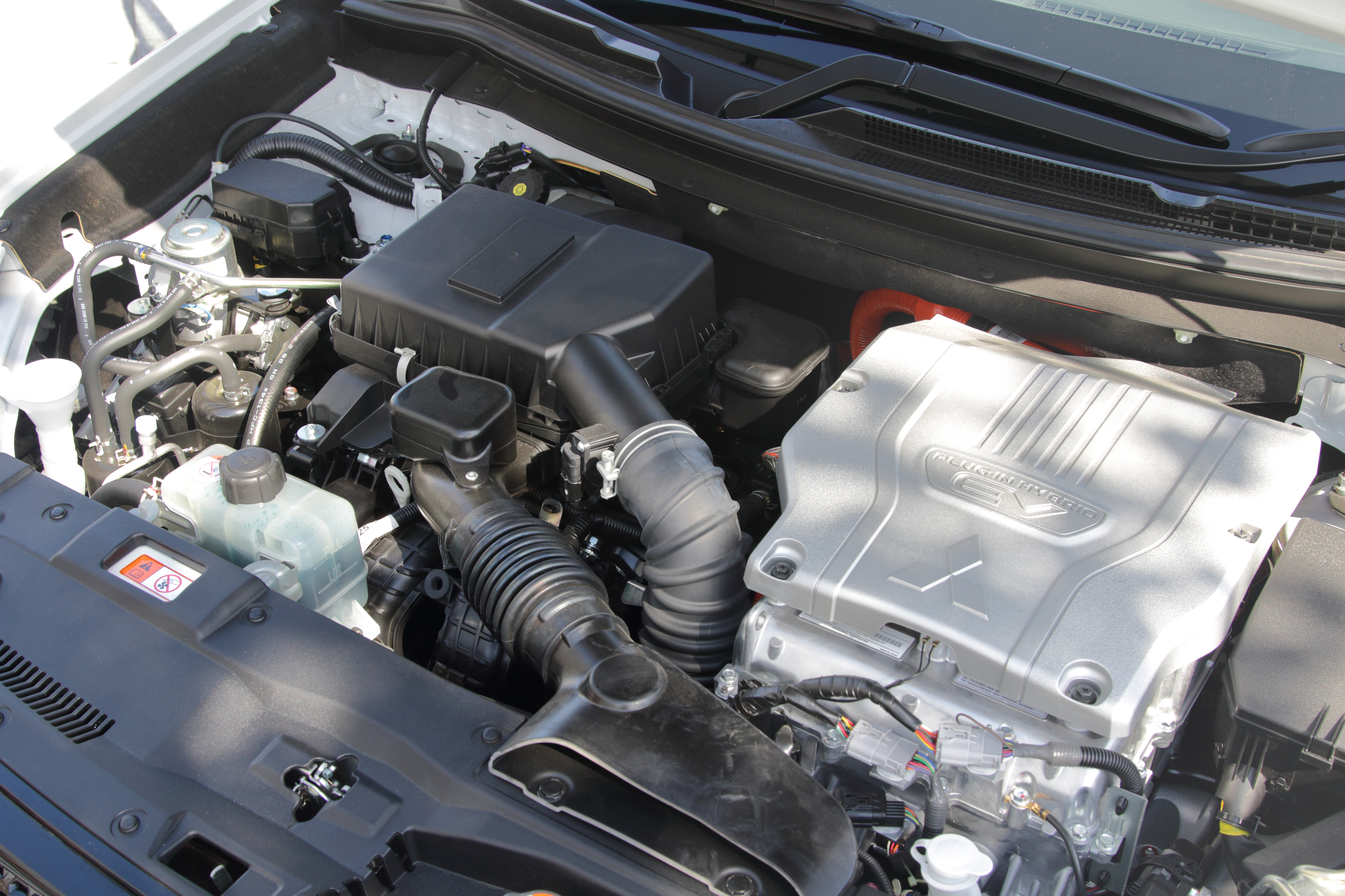 Mitsubishi 4B12